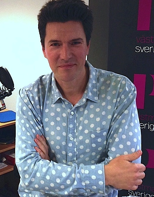 Jesper Jelse SR intervju 2013